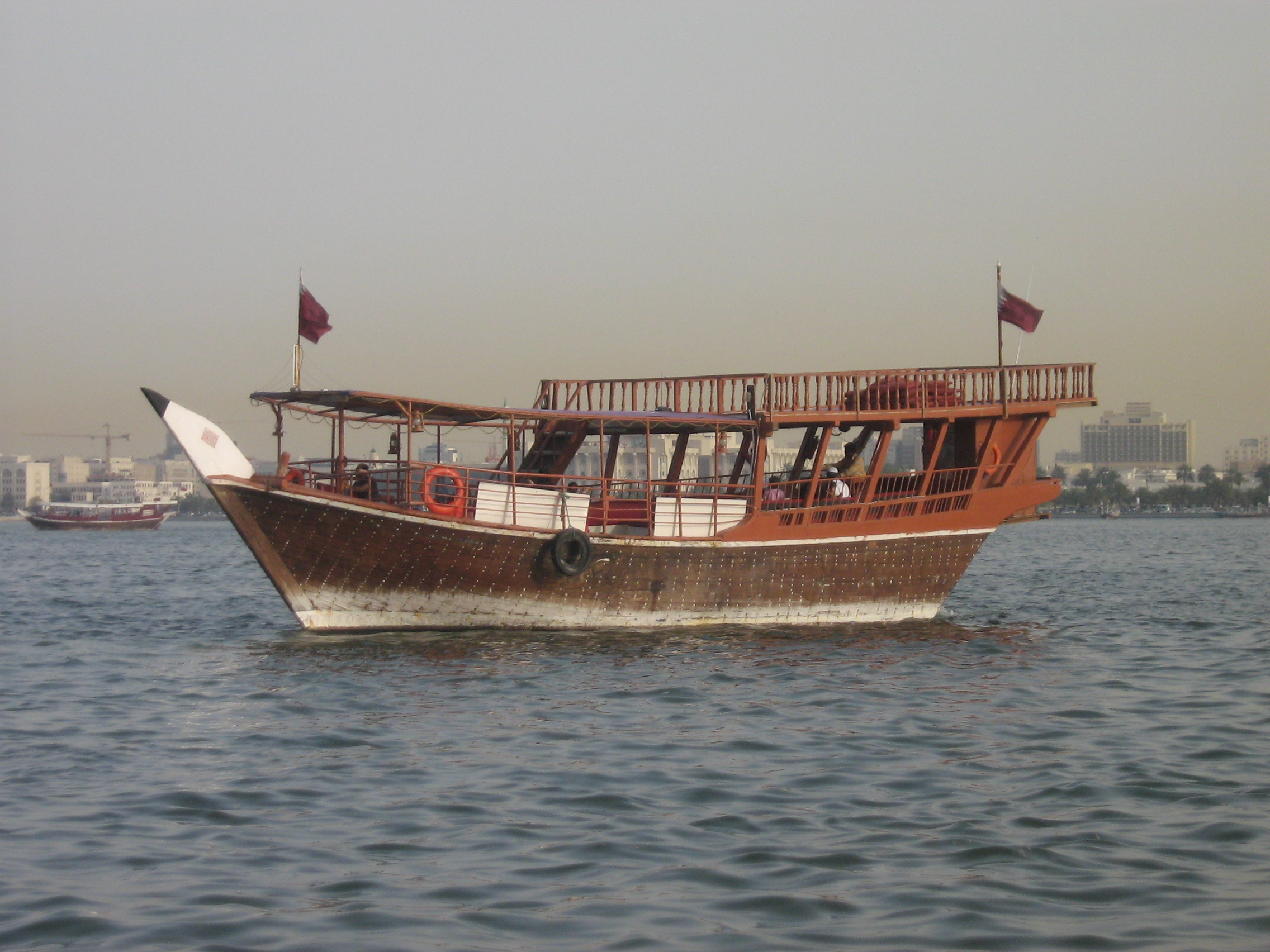 ഉരു